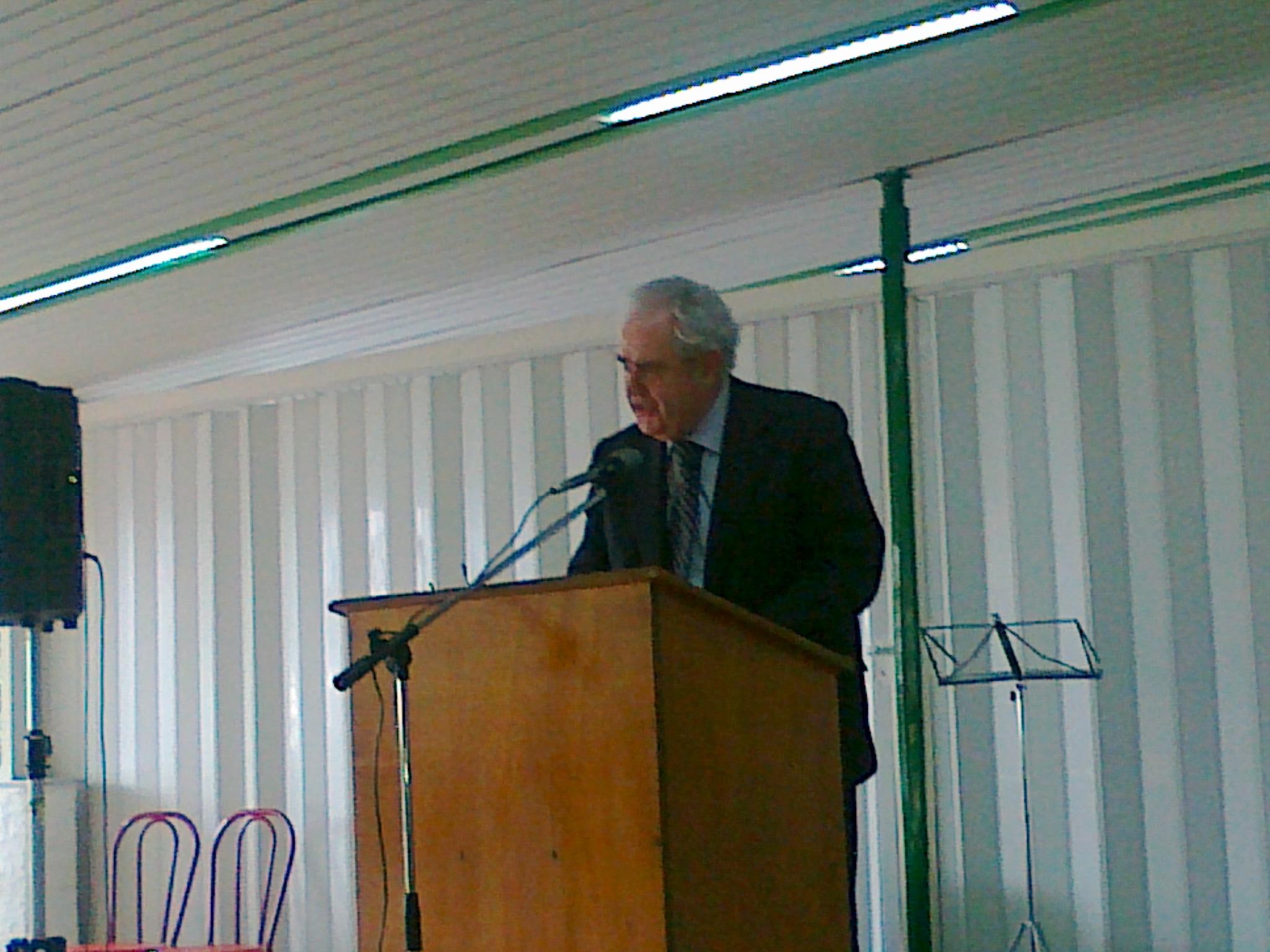 Paolo Ricca, teologo italiano e pastore Valdese.